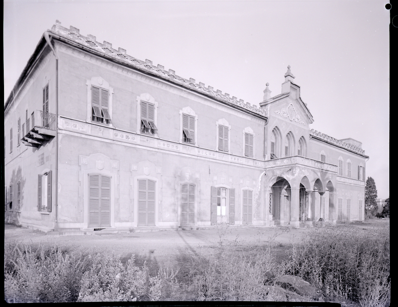 Genova-Cornigliano. Villa Vivaldi Pasqua-Raggio, già abbazia dei padri Benedettini. Facciatacon ingresso con porticato e sul lato torre quadrataServizio fotografico : Genova, 1963 / Paolo Monti. - Buste: 3, Fototipi: 3 : Negativo b/n, gelatina bromuro d'argento/ pellicola ; 10x12. - ((Serie costituita da 3 buste sciolte di negativi identificati con i nn.: 7445, 7446, 7447. - Il negativo identificato con il numero 46397 è stato realizzato per Zodiac. - Occasione: Documentazione per la pubblicazione: Italia Nostra (a cura di), "Le ville genovesi", catalogo della mostra, Genova 1962, Genova, Comune di Genova, 1967. - , presso Archivio Paolo Monti. - Fonte: Monografia di Italia Nostra (a cura di): Le ville genovesi, catalogo della mostra, Genova 1962, Genova, Comune di Genova (1967). - Fonte: Lettera di Paolo Monti: I. Carteggi/ Genova - Enrico (1963-1966), presso Archivio Paolo Monti. Camicia con documenti dattiloscritti e manoscritti vari relativi al lavoro eseguito per Italia Nostra: preventivi, lettere, inventari. - Fonte: Rubrica di Paolo Monti: Archivio fino 1-4-1961/ 31-3-1963 (1961-1963), presso Archivio Paolo Monti. - Fonte: Agenda di Paolo Monti: R 1 - Monti/ 1 aprile 1963 - 6 giugno 1964/ 6000-8193 (1963-1964)